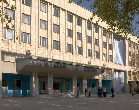 Campus SSAU